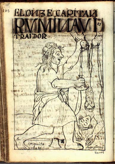 Disegno di Ruminahui che uccide Illescas